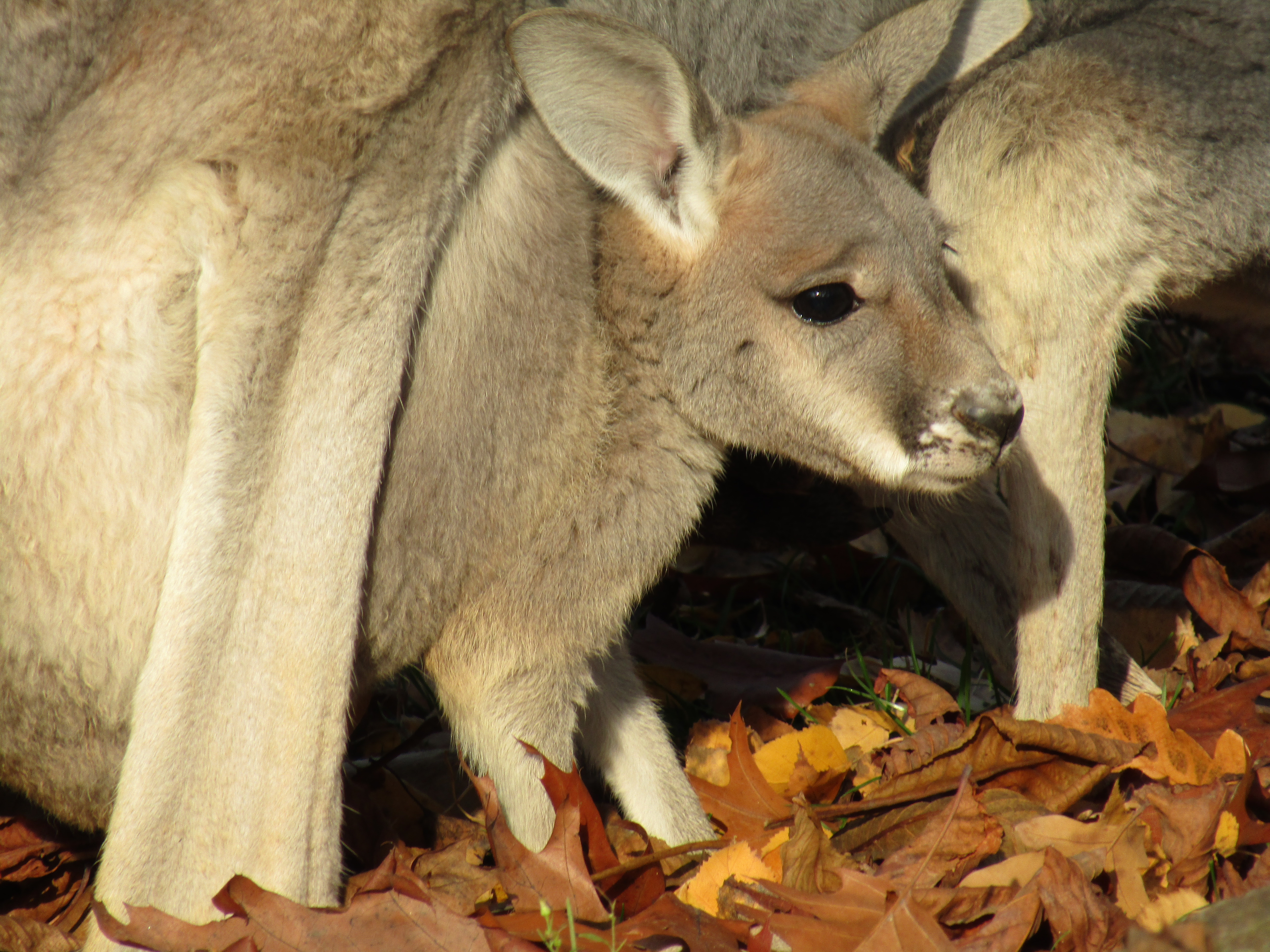 Nahaufnahme eines Kängurukindes im Beutel der Mutter